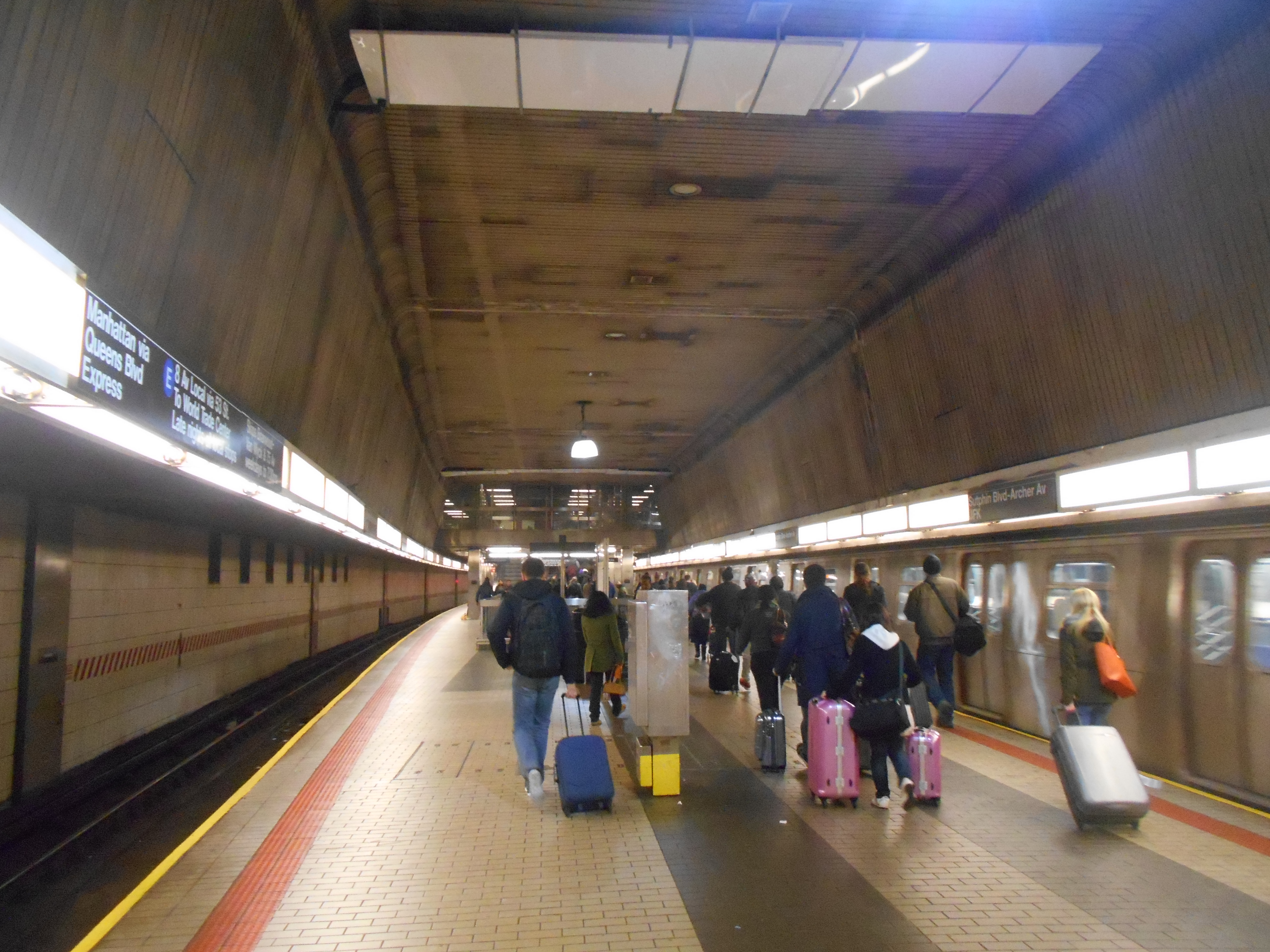 Jamaica, Queens